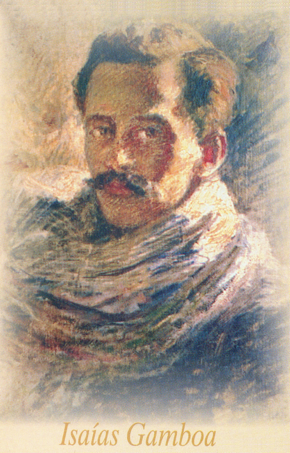 Retrato del poeta colombiano Isaías Gamboa ((1872 – 1904).